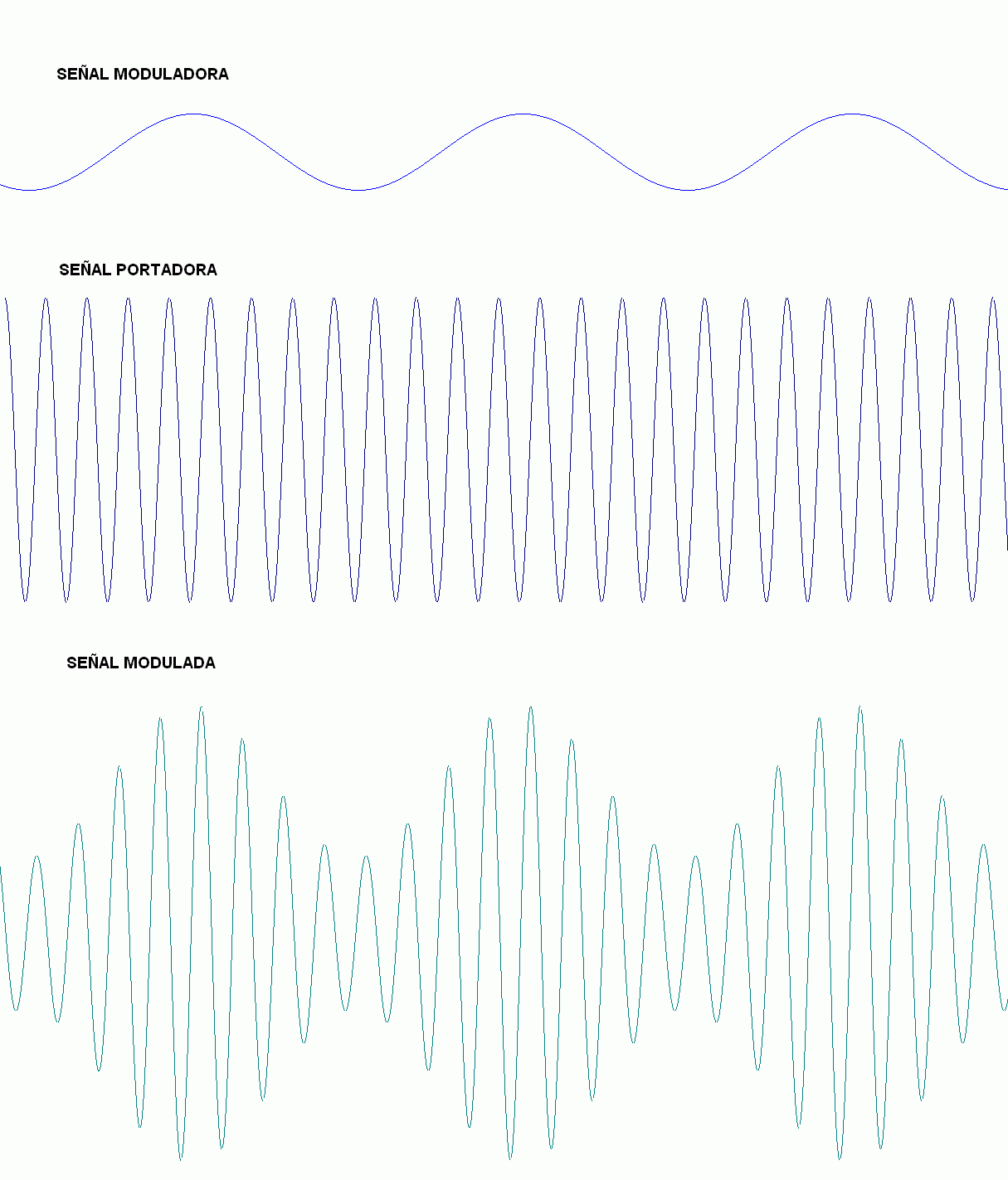 Imagen que muestra la señal moduladora, portadora y modulada de una Modulación en Amplitud.